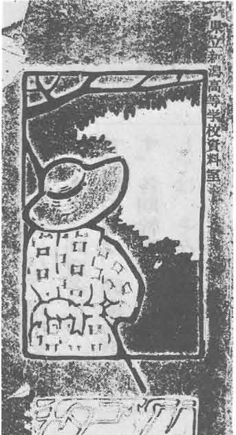 笠原軔 明治35年10月遊方会発行「夏木立」表紙絵